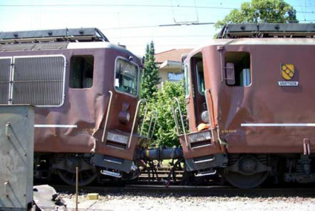 Beim Eisenbahnunfall am 4. August 2007 in Biel Rangierbahnhof entstanden am Rollmaterial Sachschäden in Millionenhöhe. Die vier BLS Re 425 wurden durch die beim Zusammenstoss vernichtete Energie stark beschädigt. Alle vier Lokomotiven waren an beiden Enden bildgleich verformt.